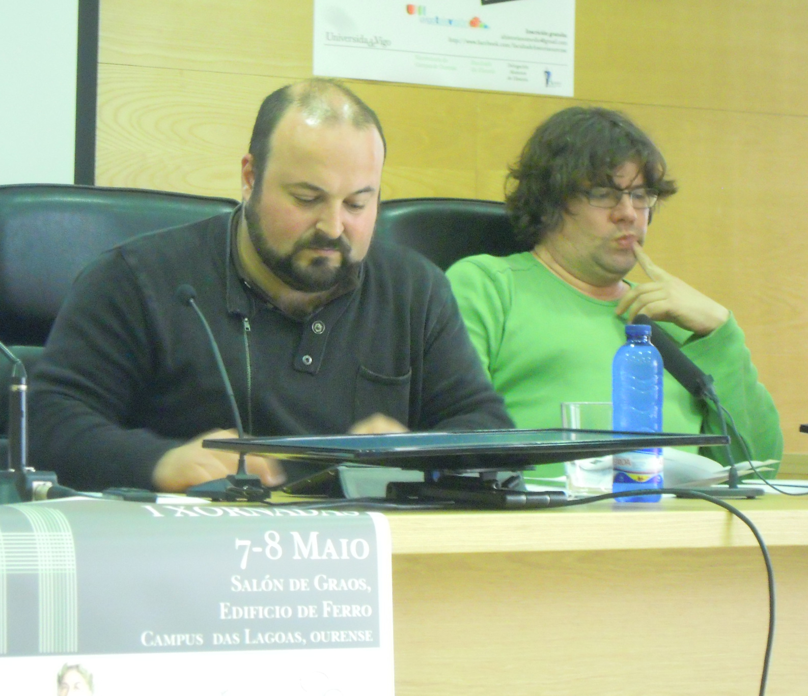 O xornalista Manuel Gago Mariño (á esquerda) na Facultade de Historia de Ourense, xunto co arqueólogo Xurxo Ayán.